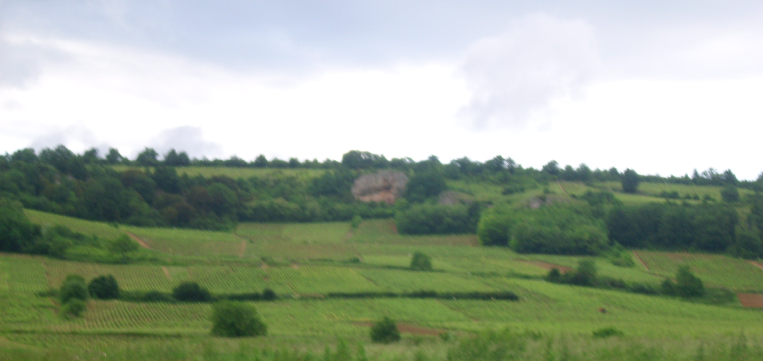 Vue des vignes de Saint-Martin-sous-Montaigu (71) et de la grosse roche du lieu dit nommé le Gros Theu.